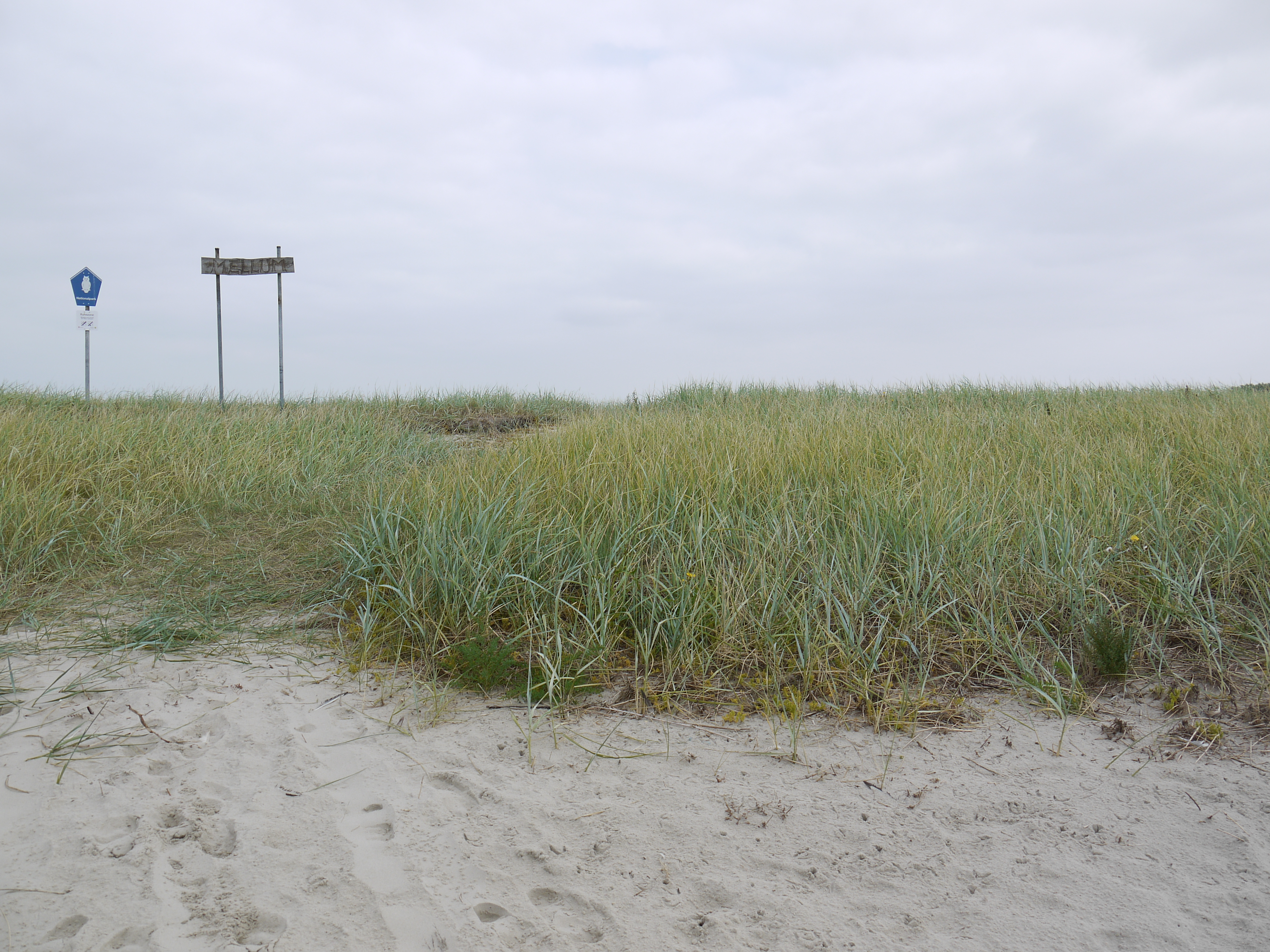 Mellum Schild